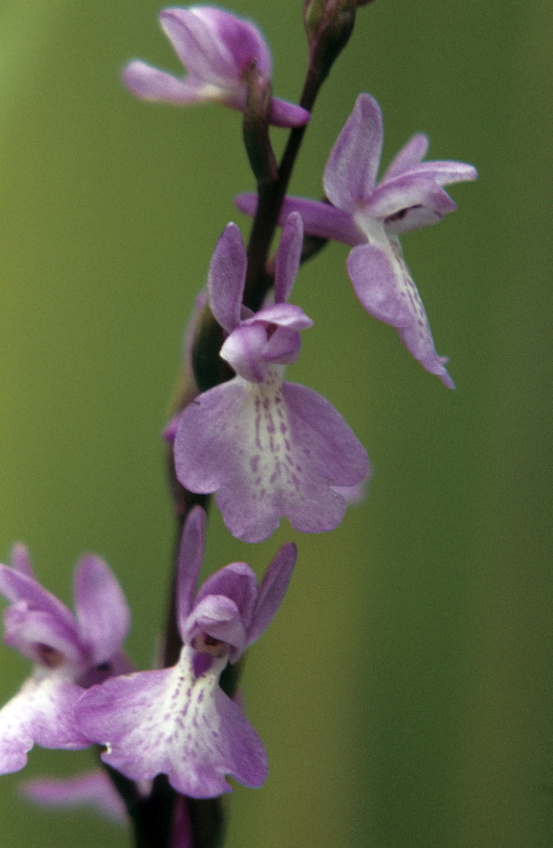 Sumpf-Knabenkraut (Orchis palustris), Ichenheim